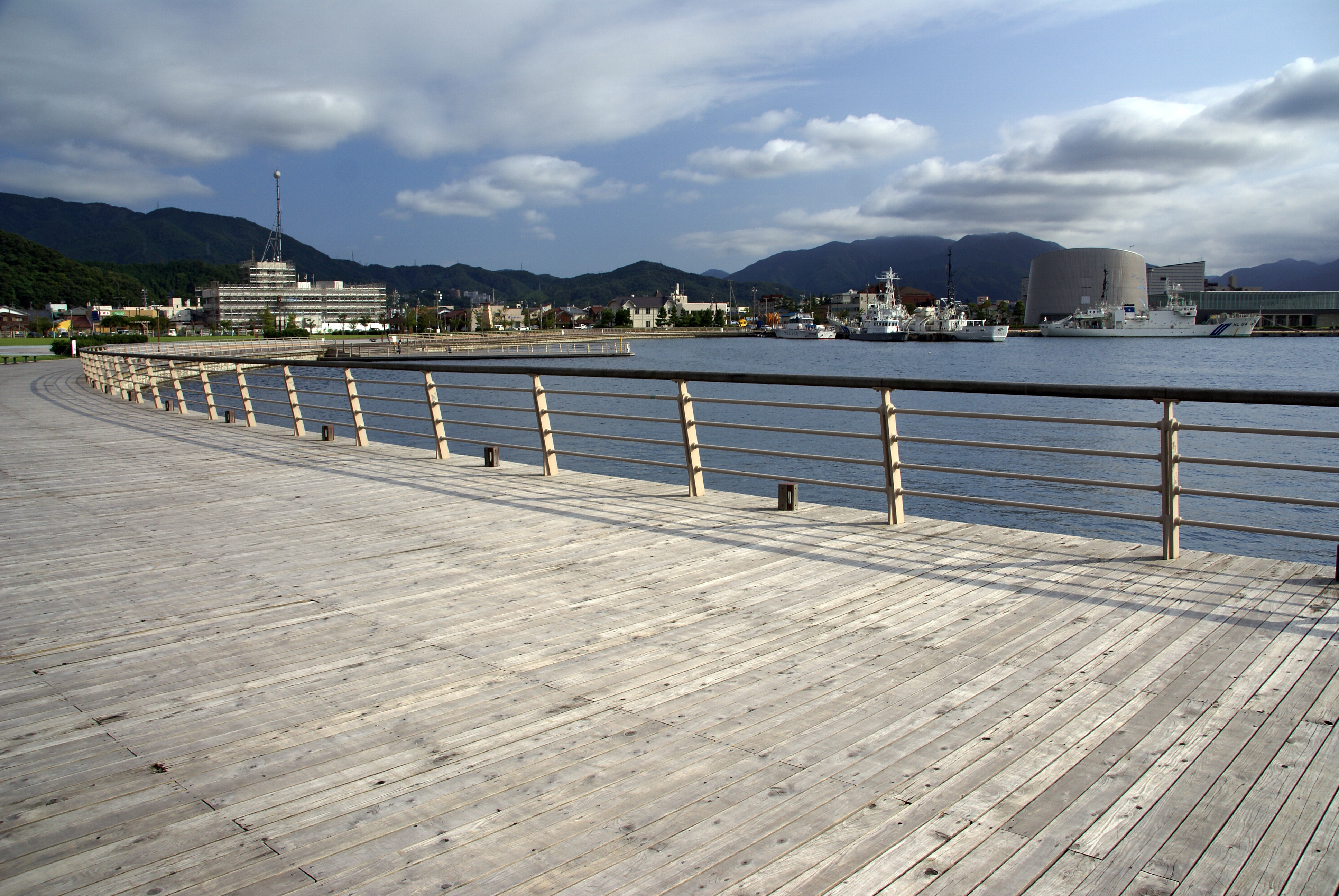 Kanegasaki ryokuchi in Tsuruga, Fukui prefecture, Japan